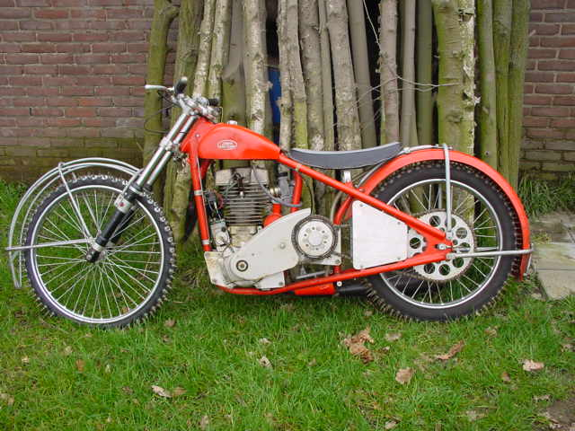 Toestemming van Yesterdays Antique Motorcycles (